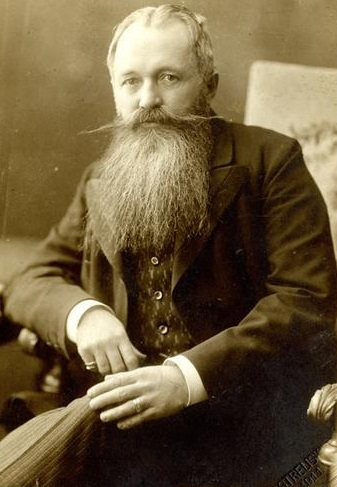 Batthyány Tivadar későbbi belügyminiszter. Strelisky Sándor fényképe (S. Lipót fia)